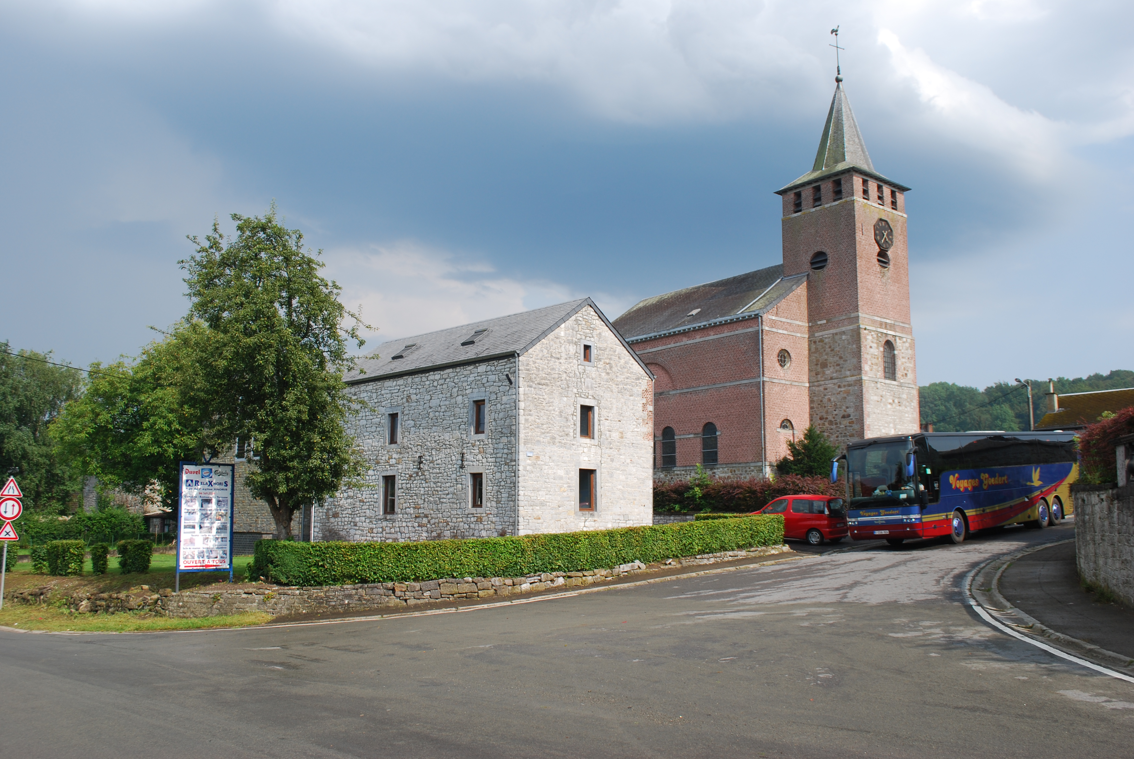 Vue de l'église Saint-Martin de Xhoris.